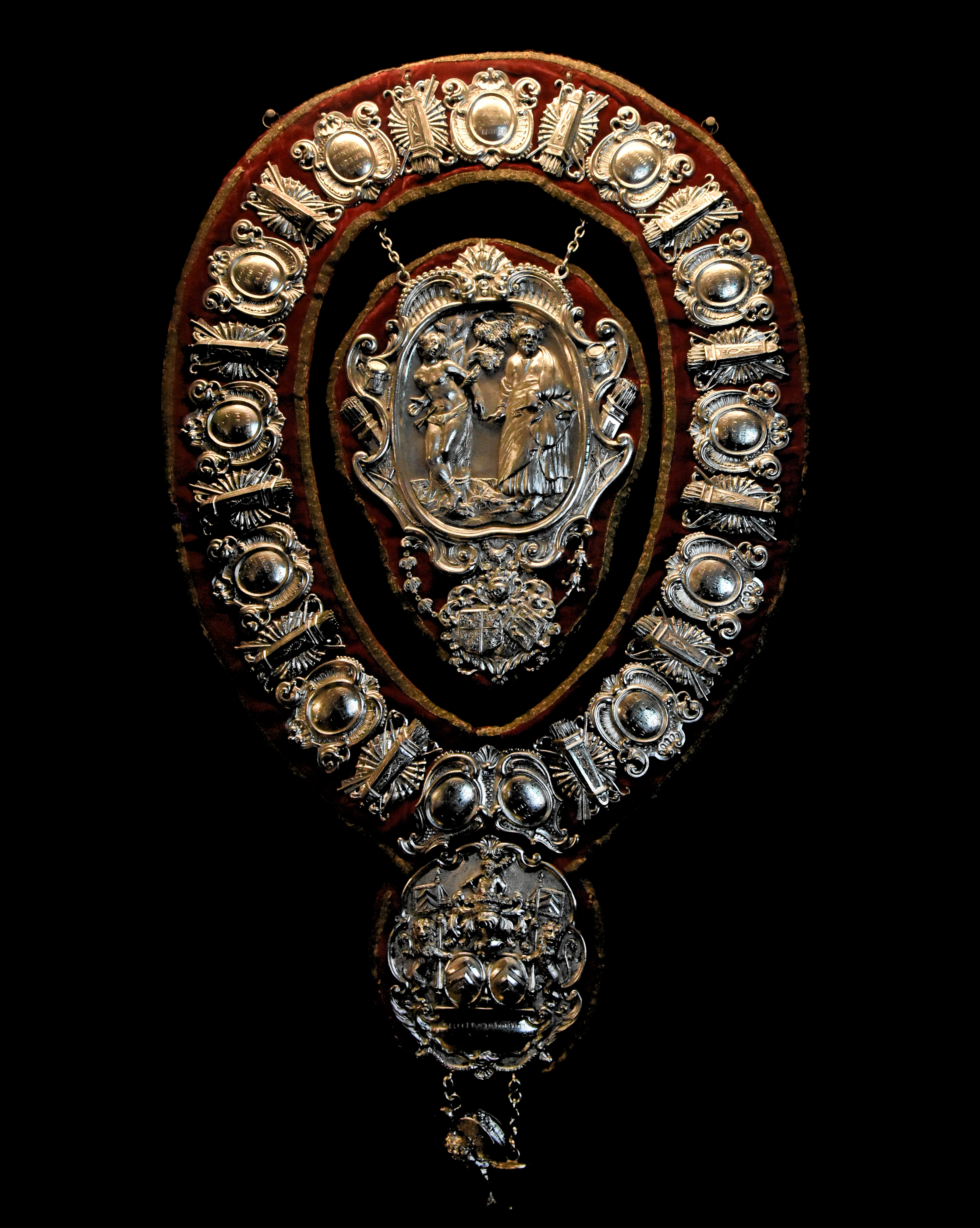 Gildenbreuk van Reynegom DIVA 27-12-2018